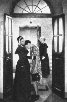 Rina Morelli e Maria Denis in "Sissignora" (Poggioli , 1941)